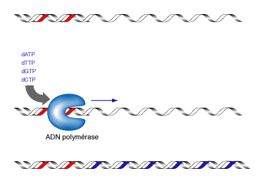 Mécanisme de polymérisation de l'ADN. Utilisable pour illustrer le principe du séquençage ou de la PCR